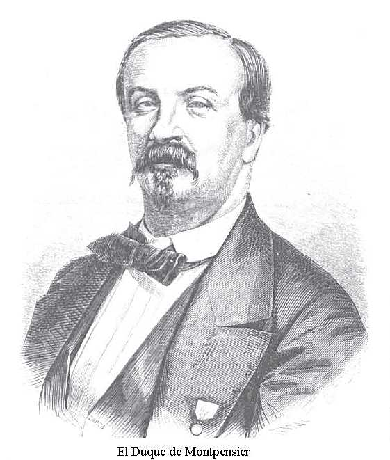 Antonio di Orleans, duca di Montpensier, uccise in duello il 12 marzo 1870 il cugino Enrico di Borbone Spagna, duca di Siviglia. Per questo fu condannato a un mese di carcere.